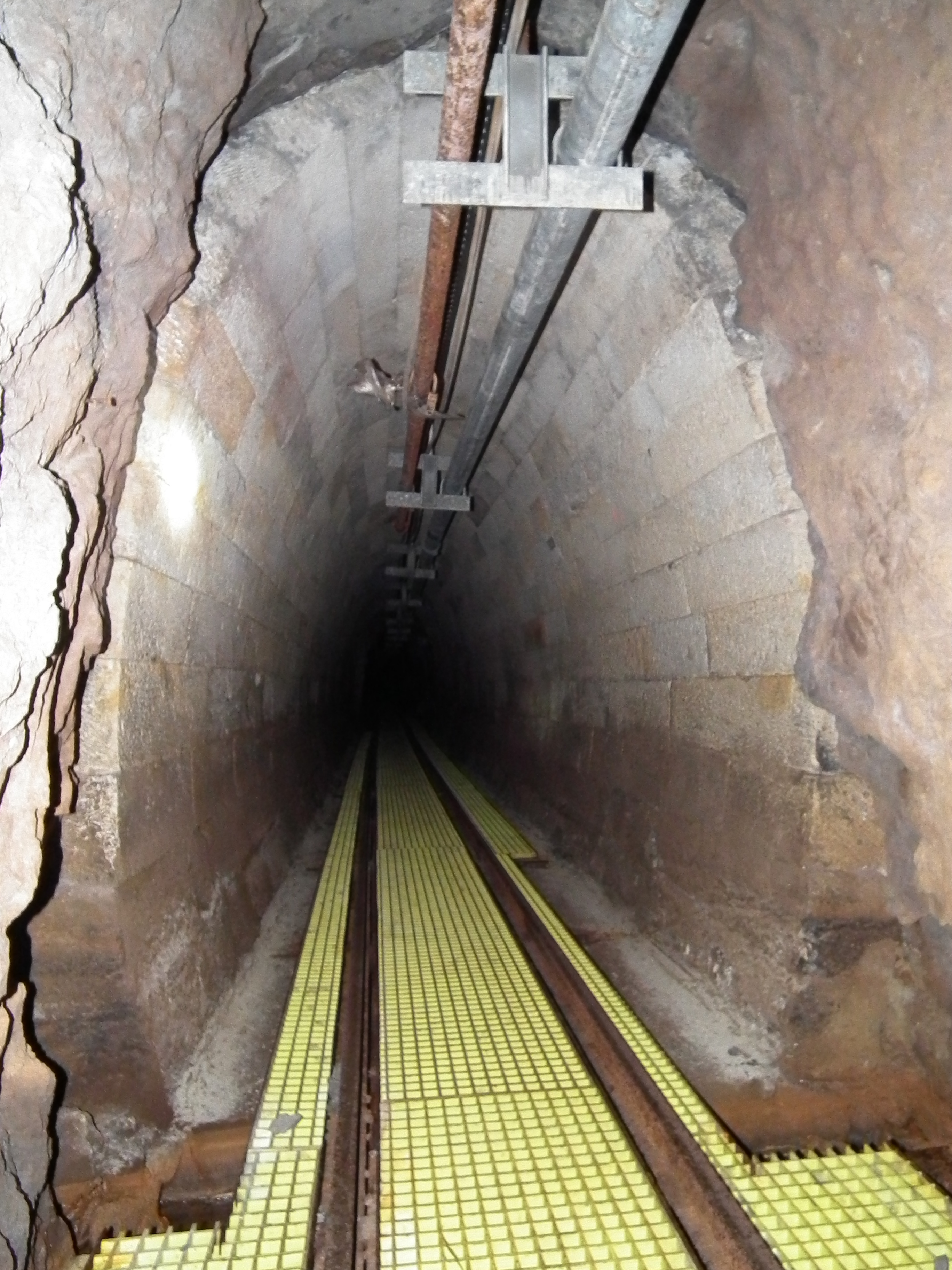 Tiefer Elbstolln; Befahrung Wismut-Stollen und Tiefer Elbstolln am 17. September 2015